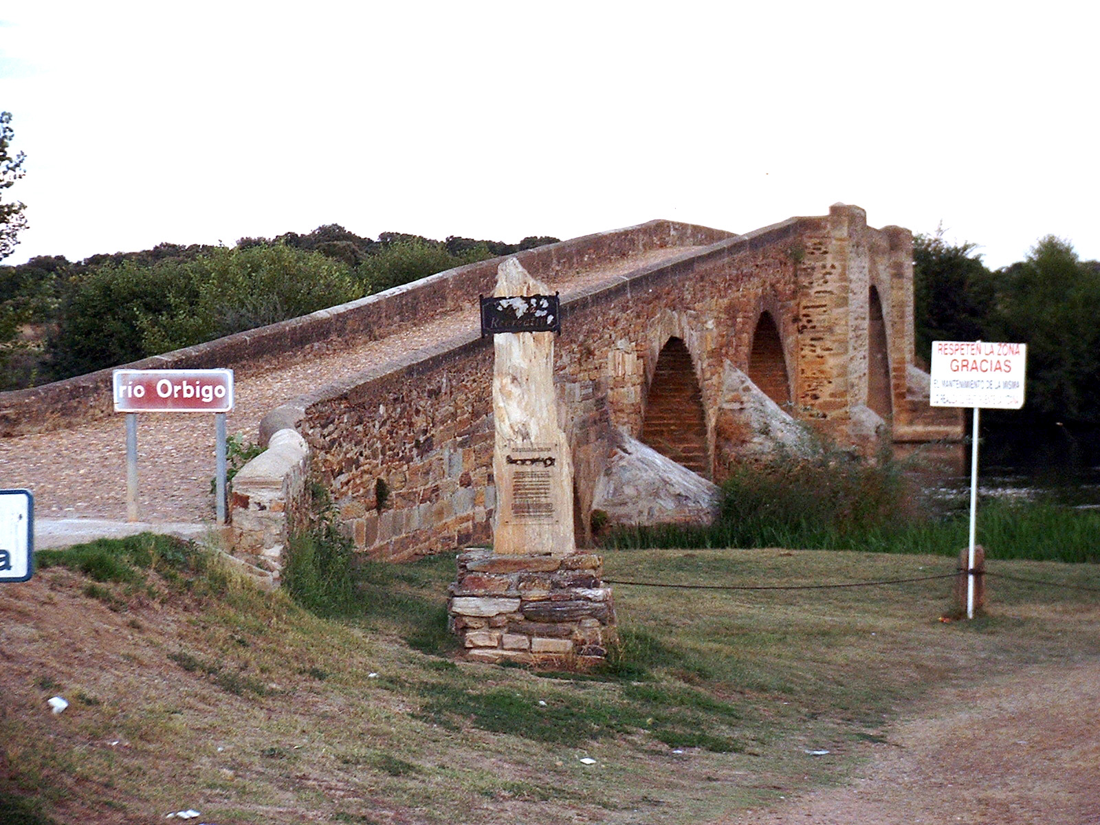 Puente de la Vizana, sobre el río Órbigo cerca de Alija del Infantado